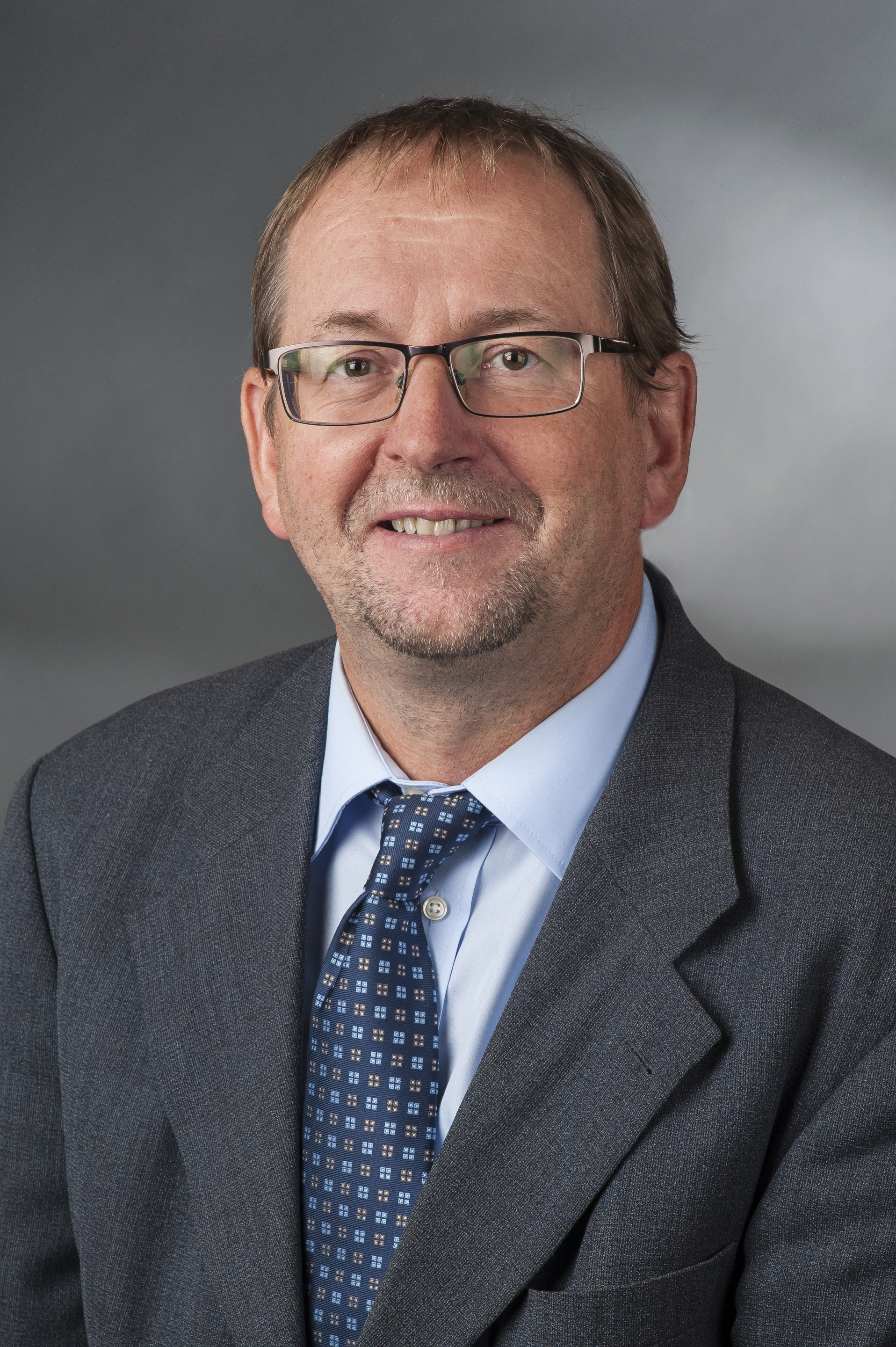 Richard Pitterle (* 2. März 1959 in Most, Tschechoslowakei) ist ein deutscher Politiker (Die Linke) und seit Oktober 2009 Mitglied des Deutschen Bundestages.